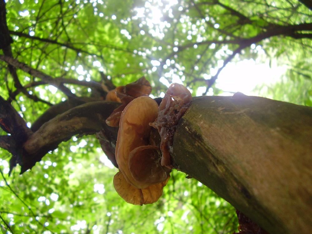 Юдини уши върху клонки на Alnus в град София, Юли 2006. © 2006 Павел Неделев